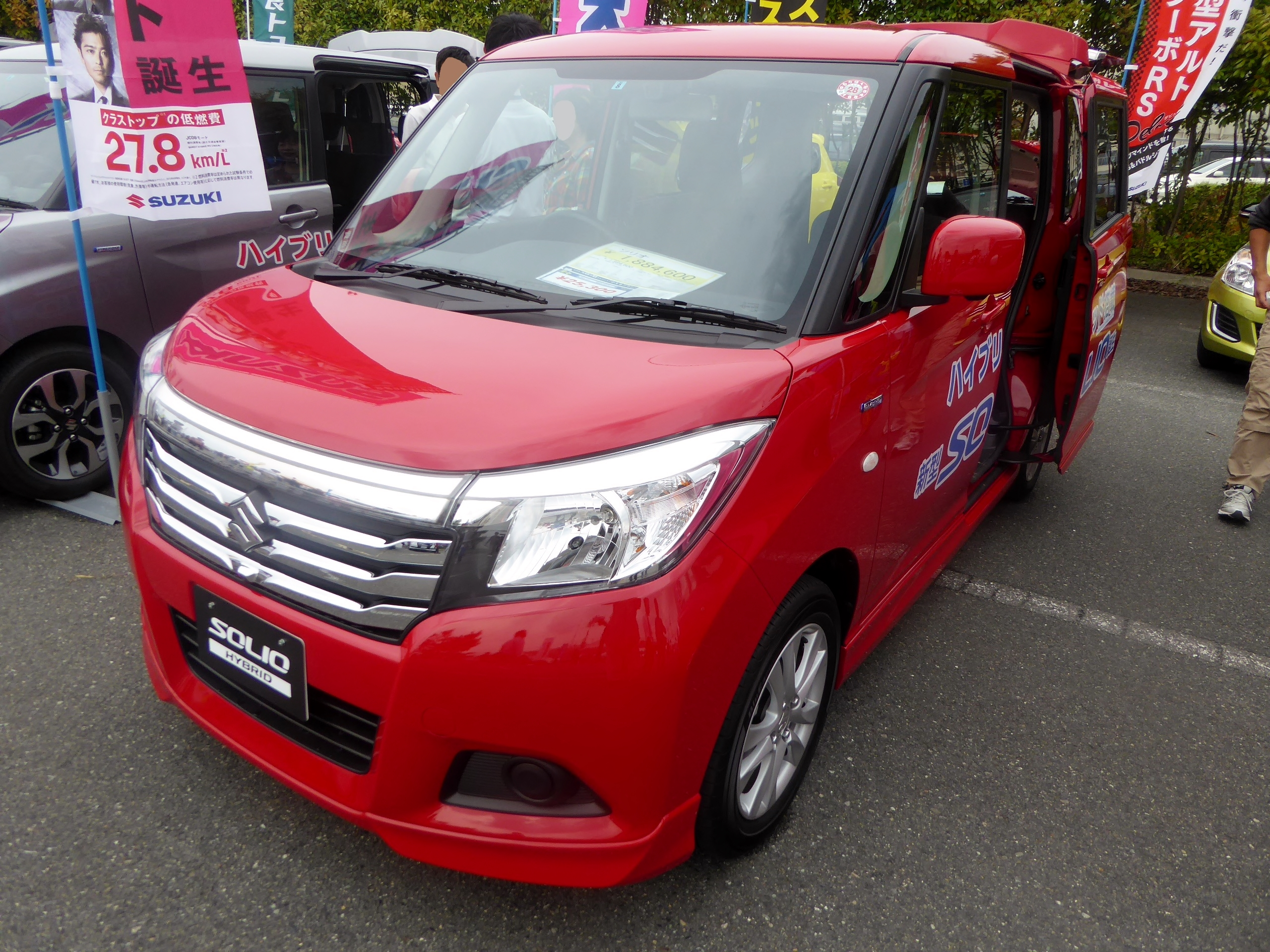 DAA-MA36S型スズキ・ソリオハイブリッドMXをフロントから撮影。